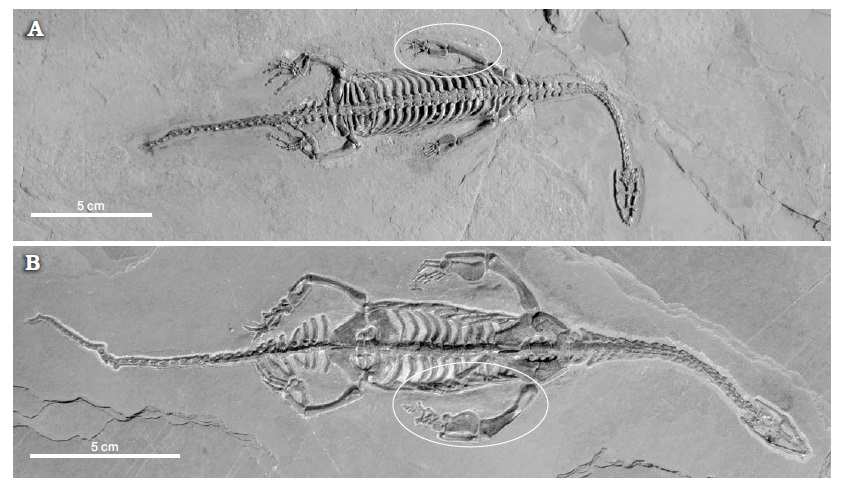 General appearance of typical individuals of pachypleurosaur Keichousaurus hui Young, 1958, late Ladinian of Middle Triassic Xingyi, Guizhou Province. The sexually dimorphic features of the forelimb are marked by black ellipses. A. WS 28-R5, female. B. WS 30-R39, male.